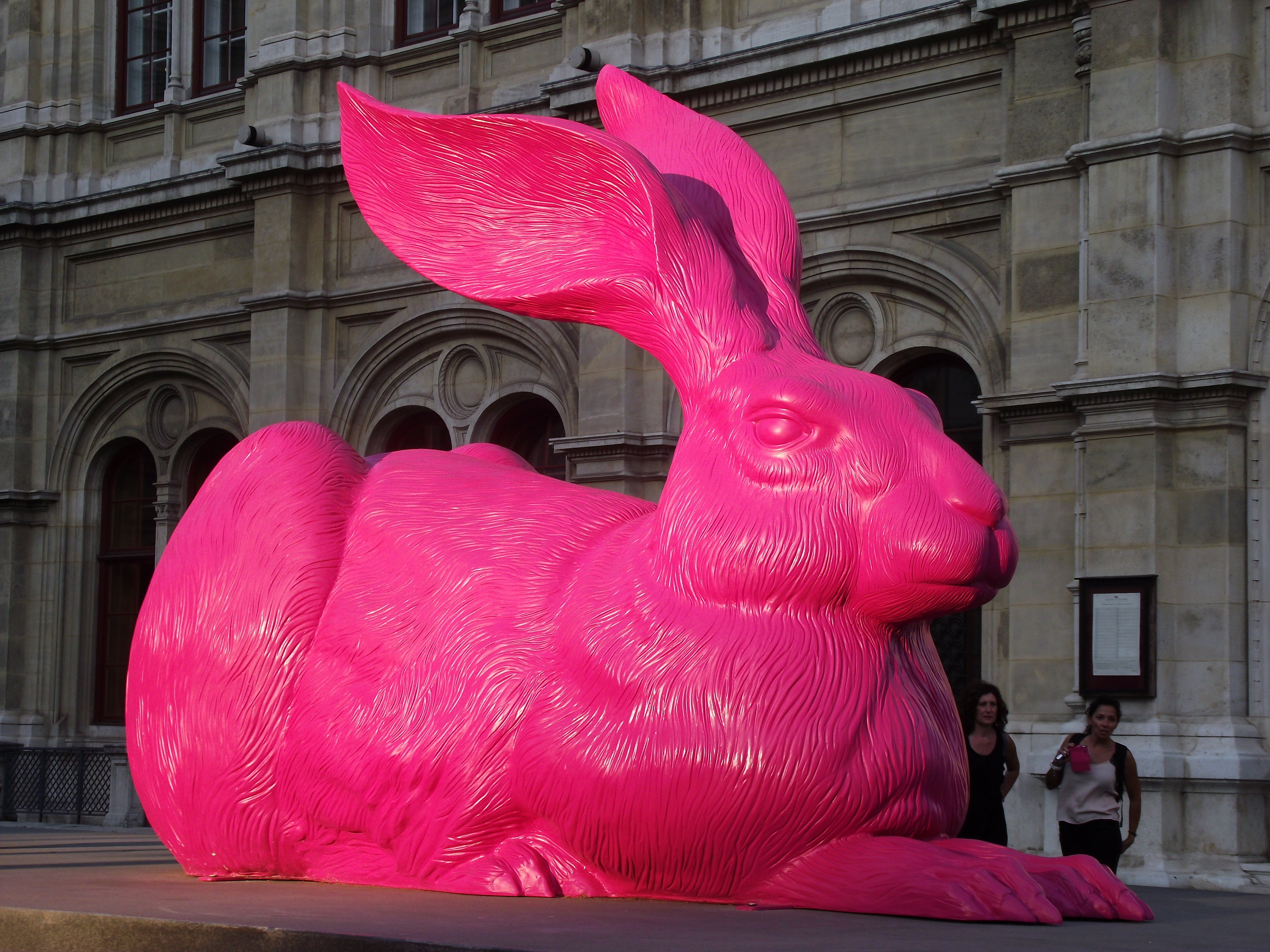 Innere Stadt. Operngasse Dürer's hare replica, giant sculpture along Wiener Oper.